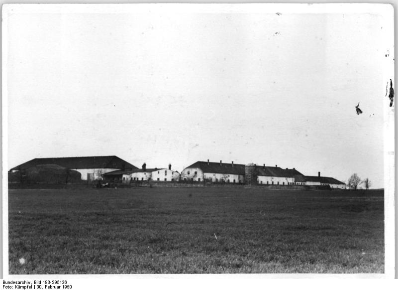 Schönerlinde, Blick auf das VEG Übergabe des Gutes Schönerlinde in deutsche Hände. Die sowjetische Kontrollkommission übergab am 29.3.50 der Vereingung volkseigener Güter Groß-Berlin in Schönerlinde das bishher von ihr benutzte Gut in Lindenhof mit den Teilen Schönerlinde, Blankenfelde und Buchholz. Es handelt sich um ein größeres Gut, das sich in einem ausgezeichnetem Zustand befindet. UBz: Zwischen neubestellten Feldern in der flachen Umgebung Berlins liegt das Gut Schönerlinde. Aufn.: Illus Kümpfel 3 5990-50 30.3.50 Leihweise Illus Berlin W8